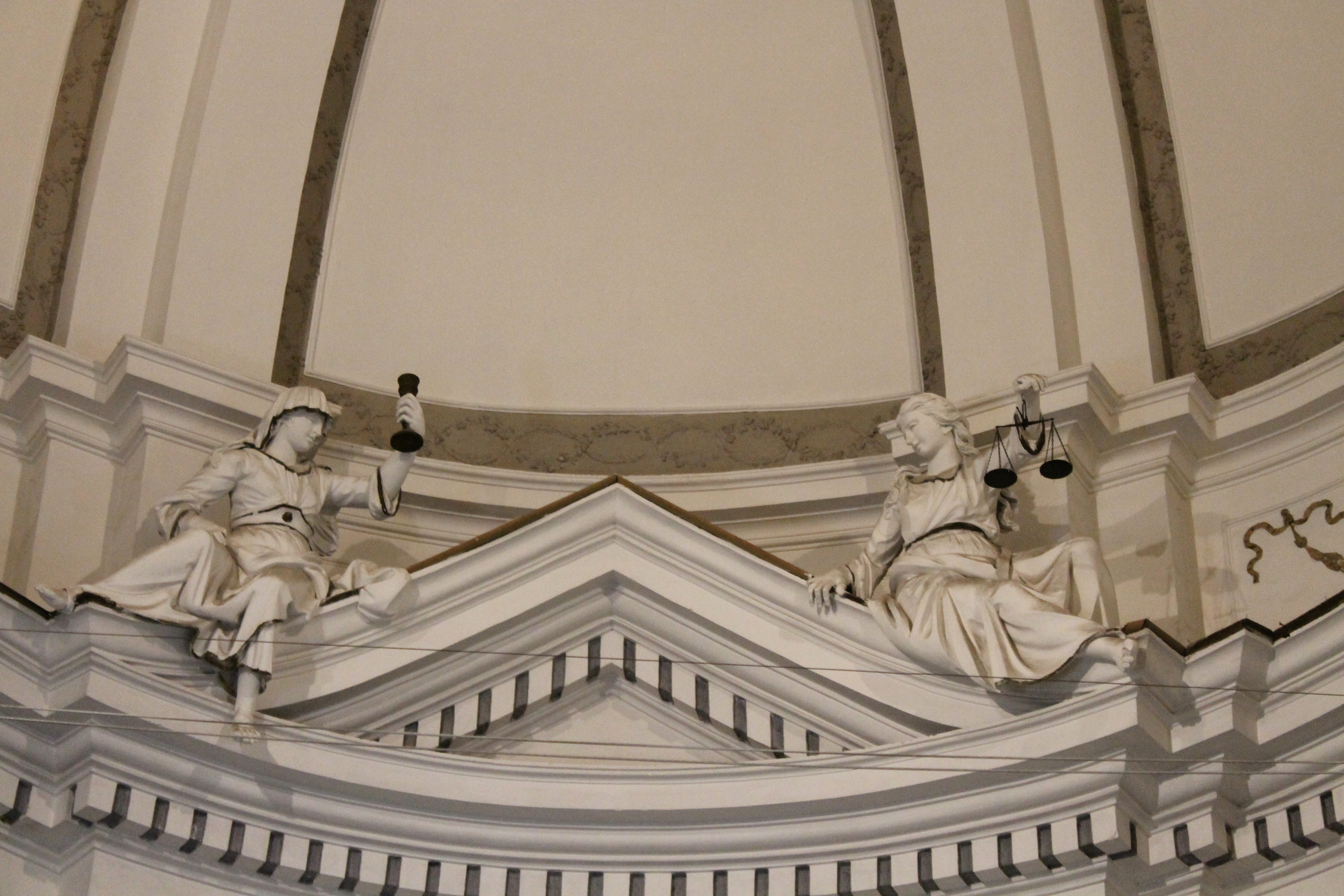 La chiesa dedicata alla S.S. Trinità e San Marziano sorge sulle rovine del cinquecentesco palazzo La Palumba. Costruita dopo il terremoto del 1693, la sua struttura si presenta a torretta, svettante verso l'alto: dalle sue terrazze e possibile ammirare paesaggi mozzafiato. Al suo interno custodisce opere di grande fattura, fra cui un bellissimo affresco di Sebastiano Lo Monaco nella volta della navata. Il pavimento è interamente ricoperta di ceramica di Caltagirone del XVIII secolo. Troviamo diverse tele, fra cui una crocifissione di Giuseppe Velasco e una pala raffigurante Sant'Antonio, del XIV sec, circa. La chiesa fa parte del gruppo dei monumenti nazionali.